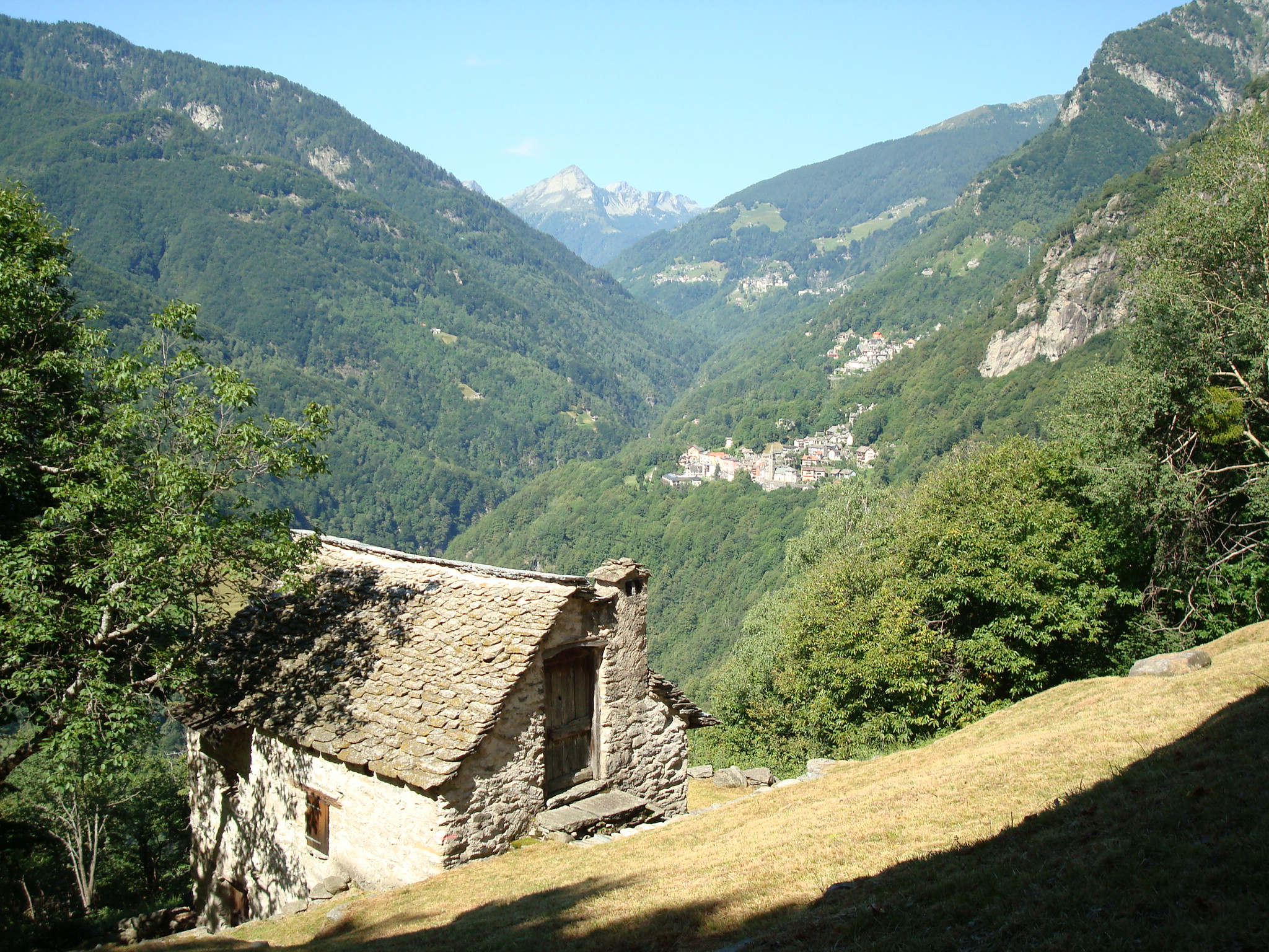 La Campeina